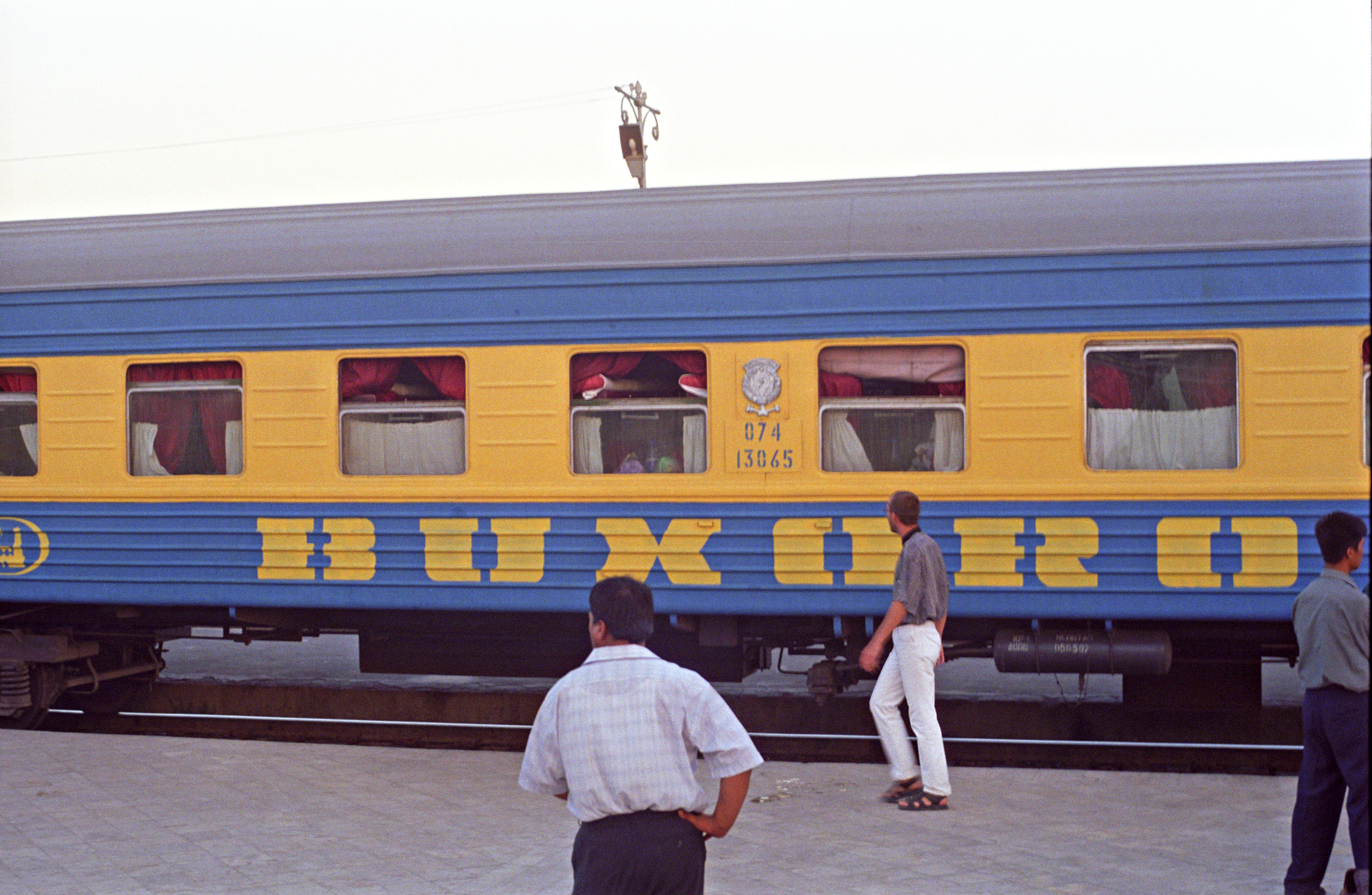 Usbekistan: Waggon des Nachtzuges nach Taschkent am Bahnhof von Buxoro